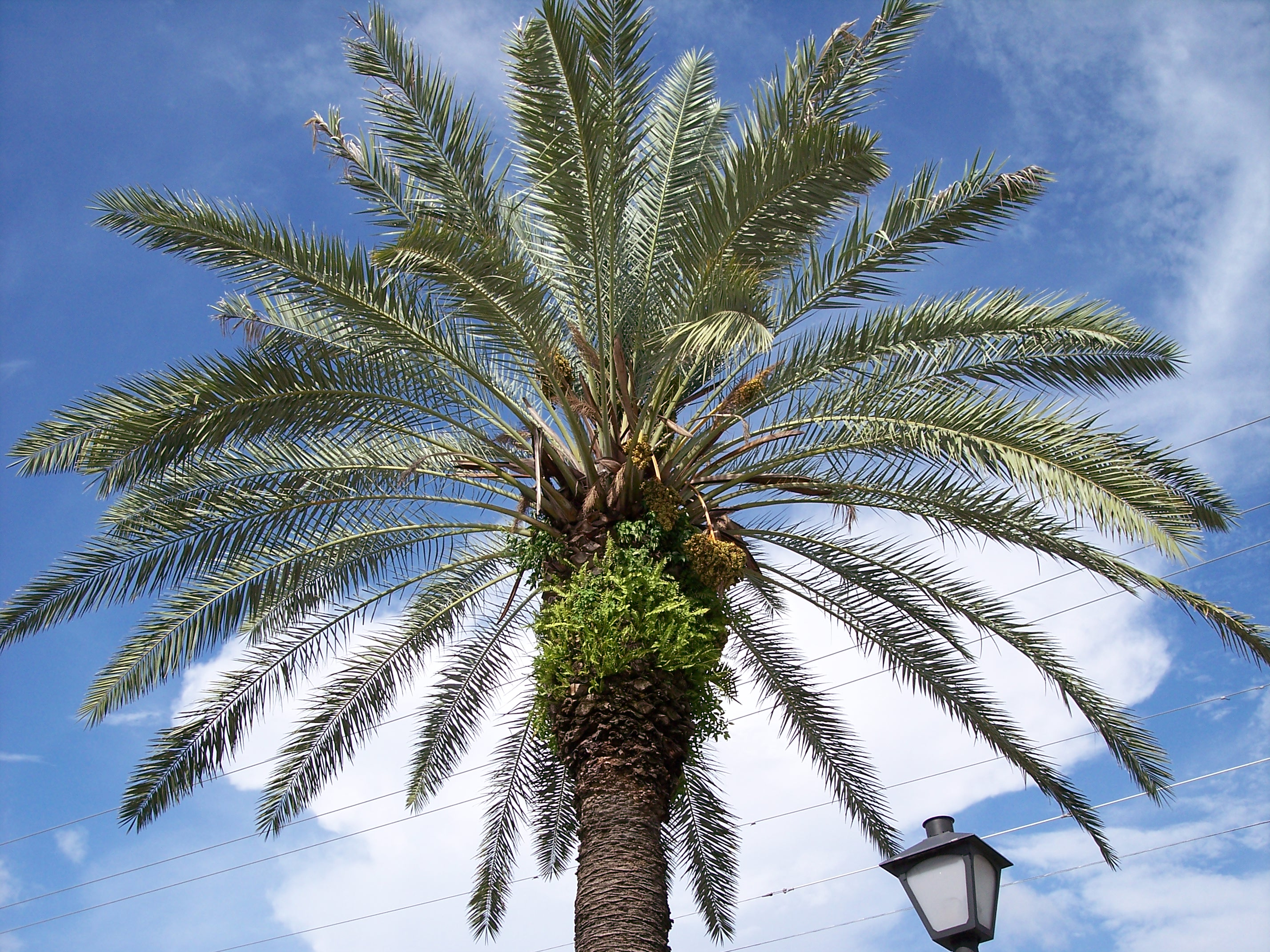 Phoenix dactylifera